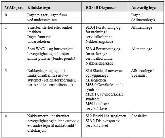 Tabellen for WAD skadegrader